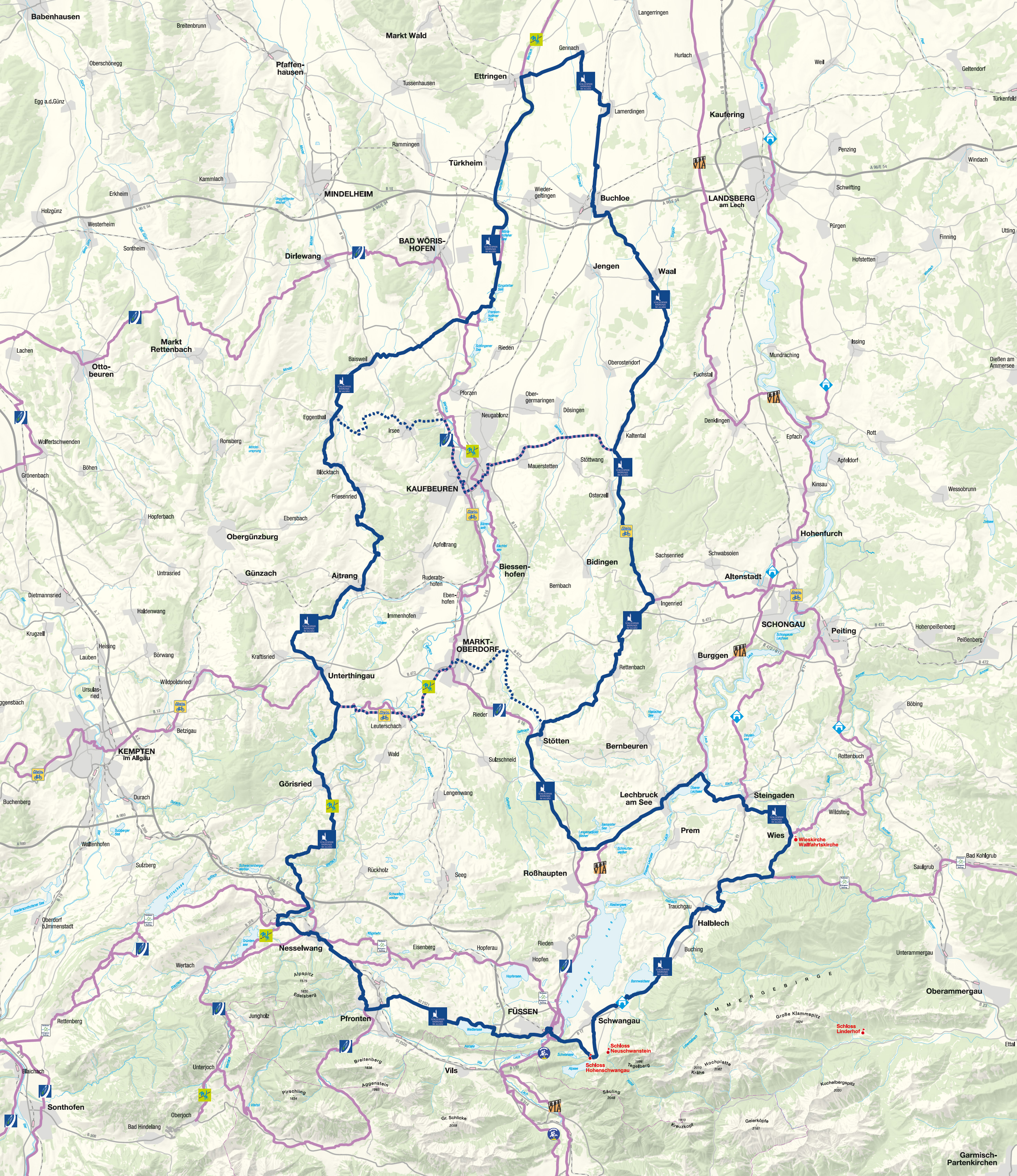 Übersichtskarte der Schlossparkradrunde im Allgäu